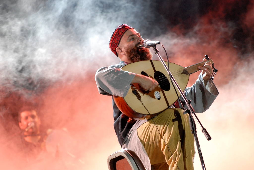 Rami Chehade